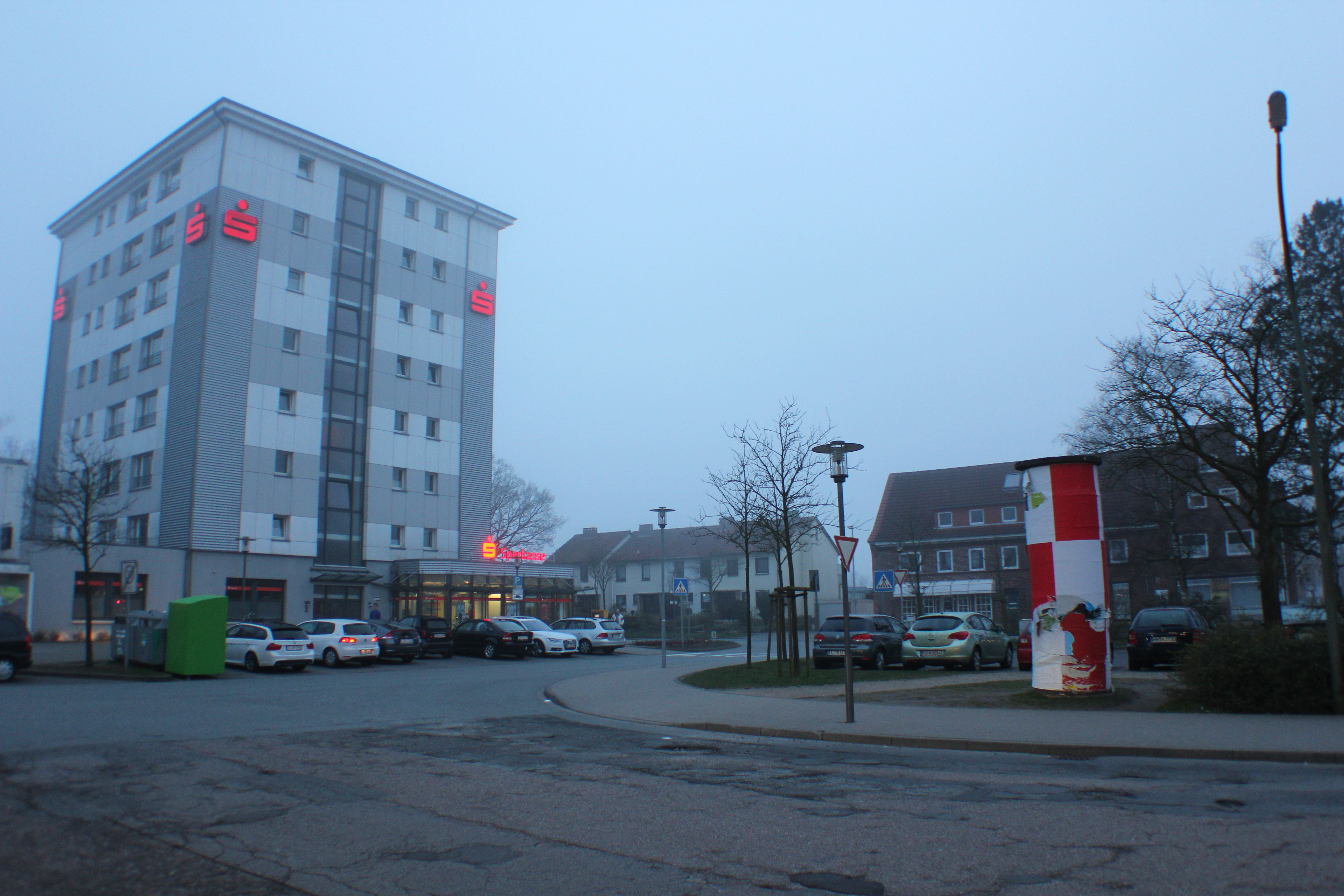 Twedter Plack Hochhaus mit der Südwest-Ecke und den dortigen Reihenhäusern (Flensburg März 2014), Bild 02